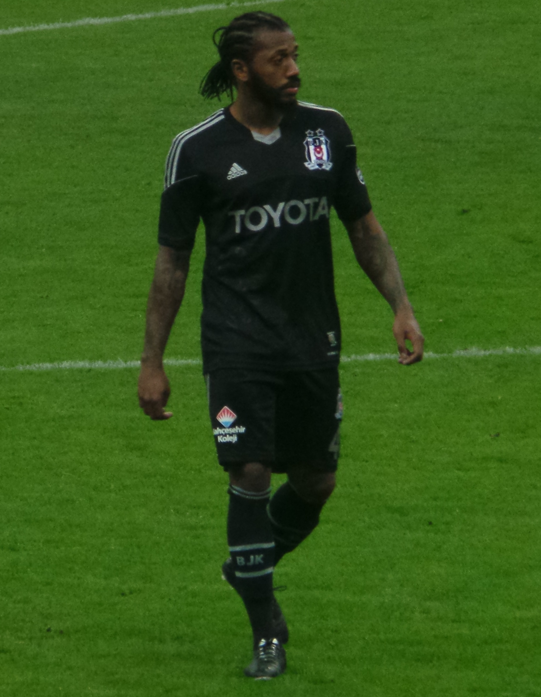 Manuel Fernandes